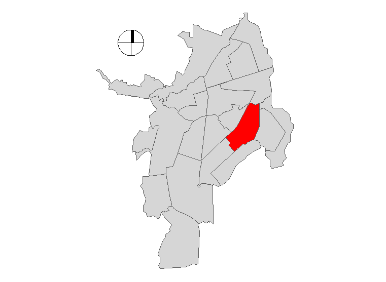 Comuna 13 de Santiago de Cali, Colombia.